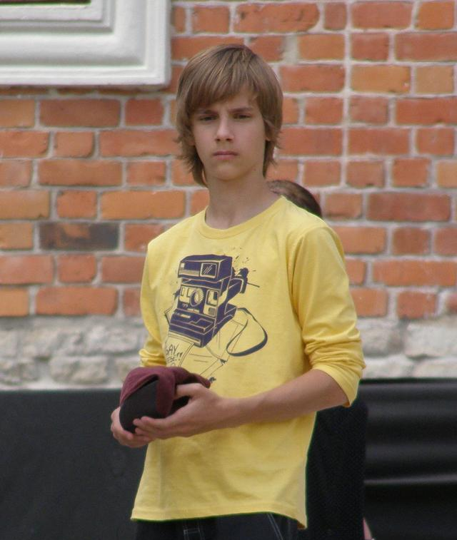 Maciej Musiał na planie serialu "Ojciec Mateusz" (Sandomierz)